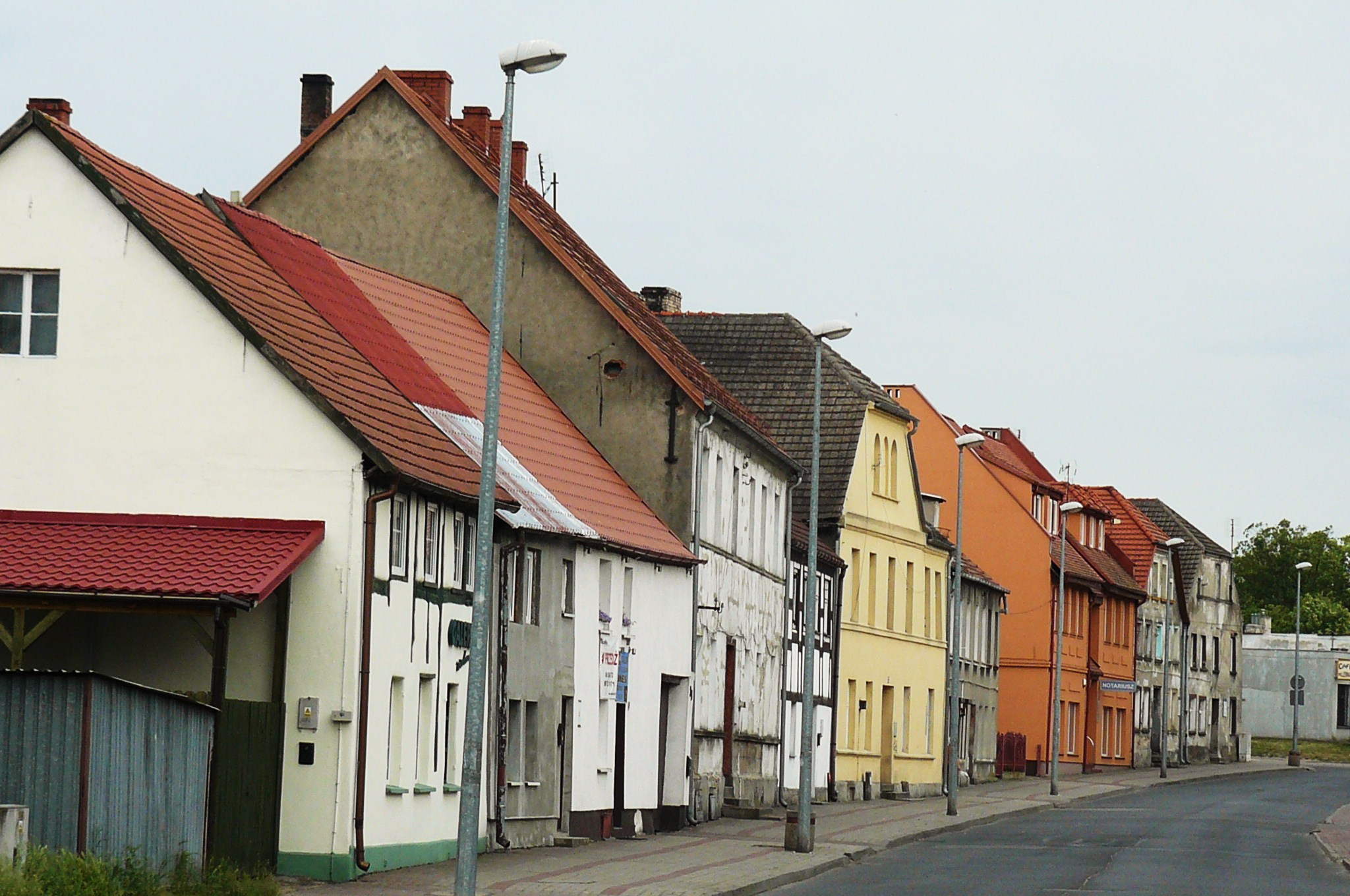 Starówka w Strzelcach Krajeńskich.